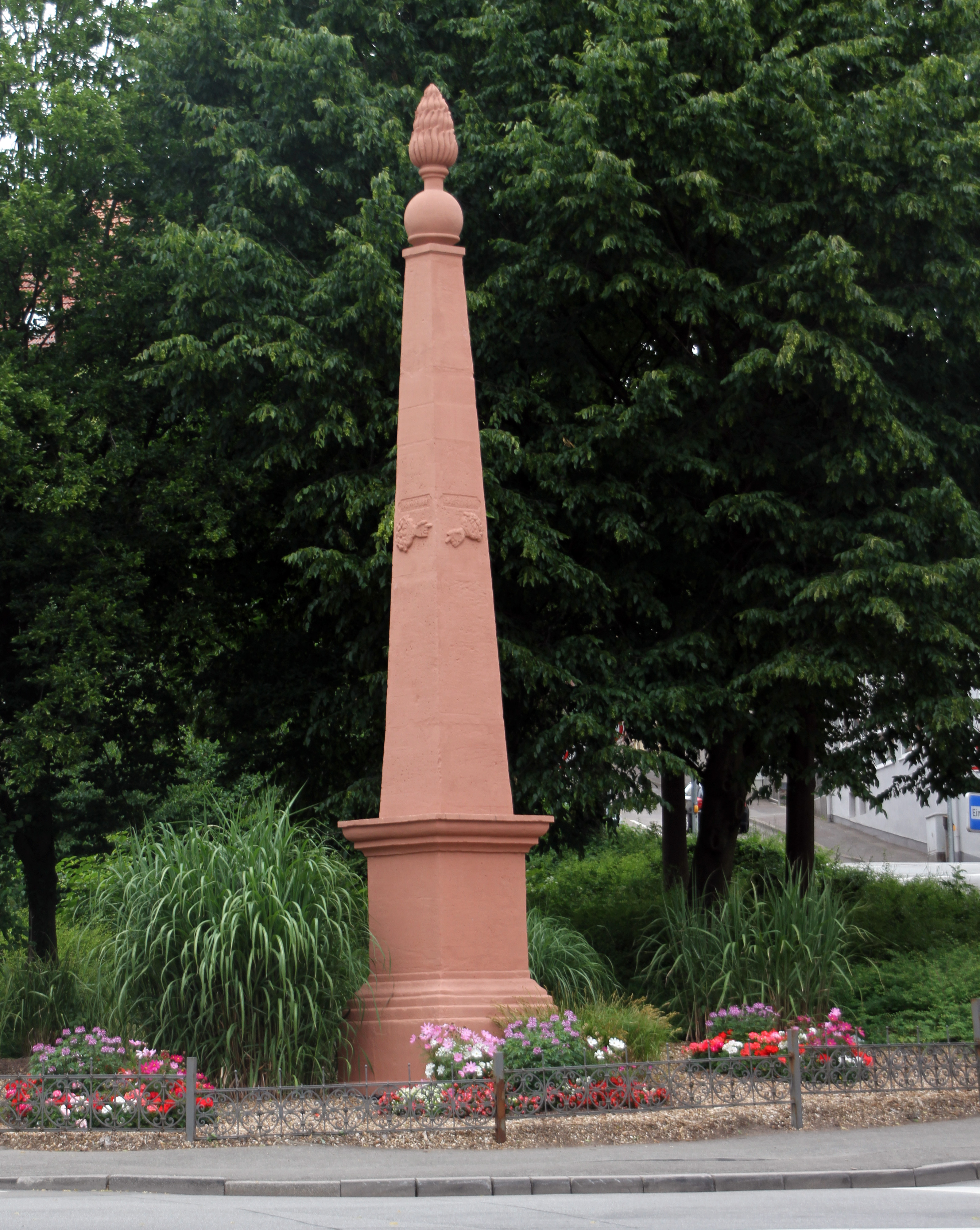 Pirmasens, Lemberger Straße; Obelisk, Sandstein, 1771.